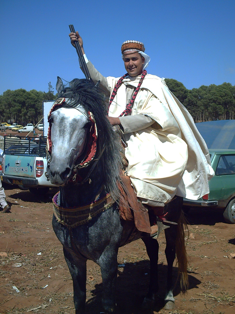 Fantasia Mostaganem 28-05-2008